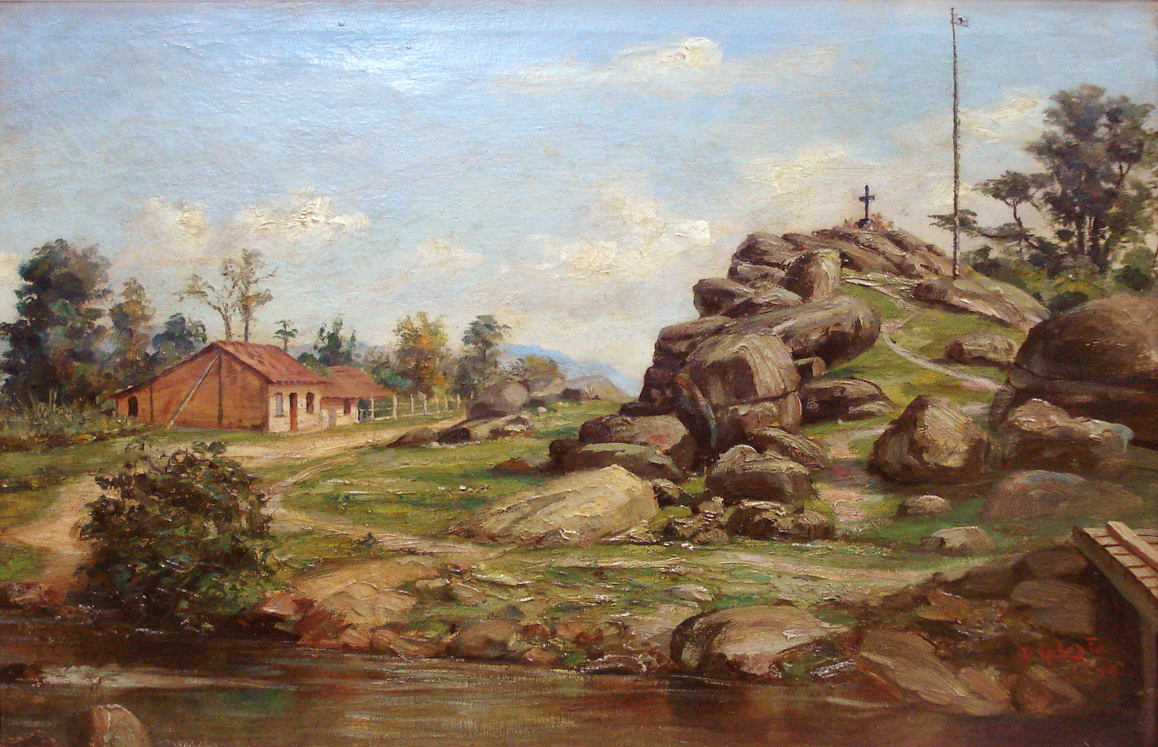 Paisagem com cruzeiro, 1920. Óleo sobre tela, 40 x 60 cm.